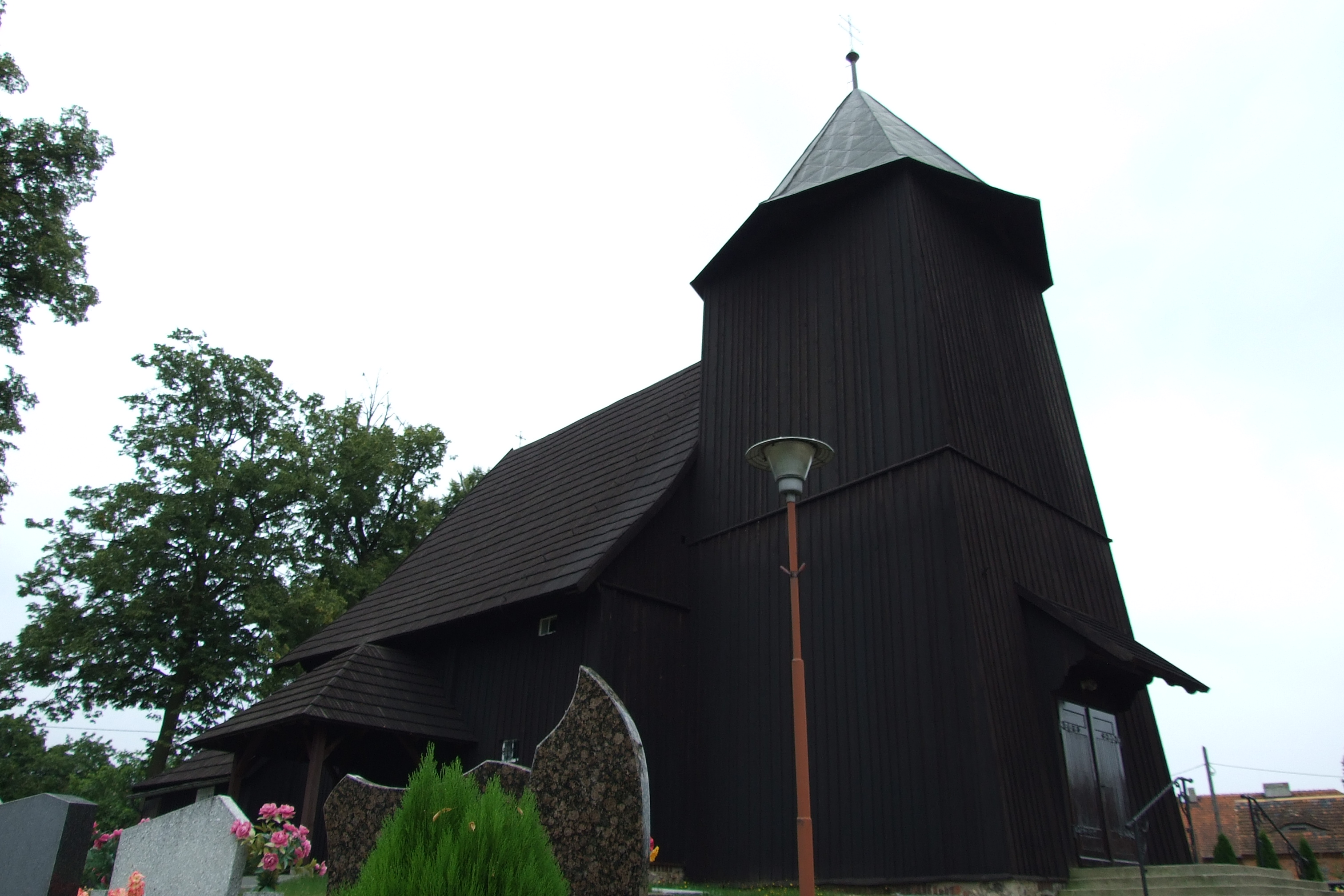 Kościół św. Marii Magdaleny w Boroszowie